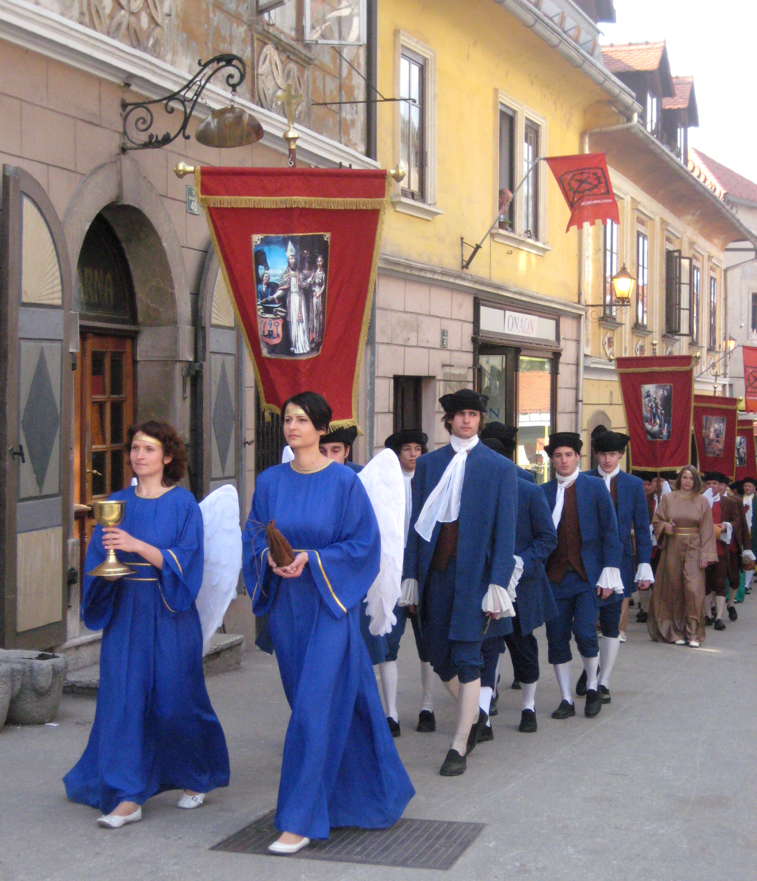 Škofjeloški pasijon (Processio Locopolitana), izvedba 2009 v Škofji Loki